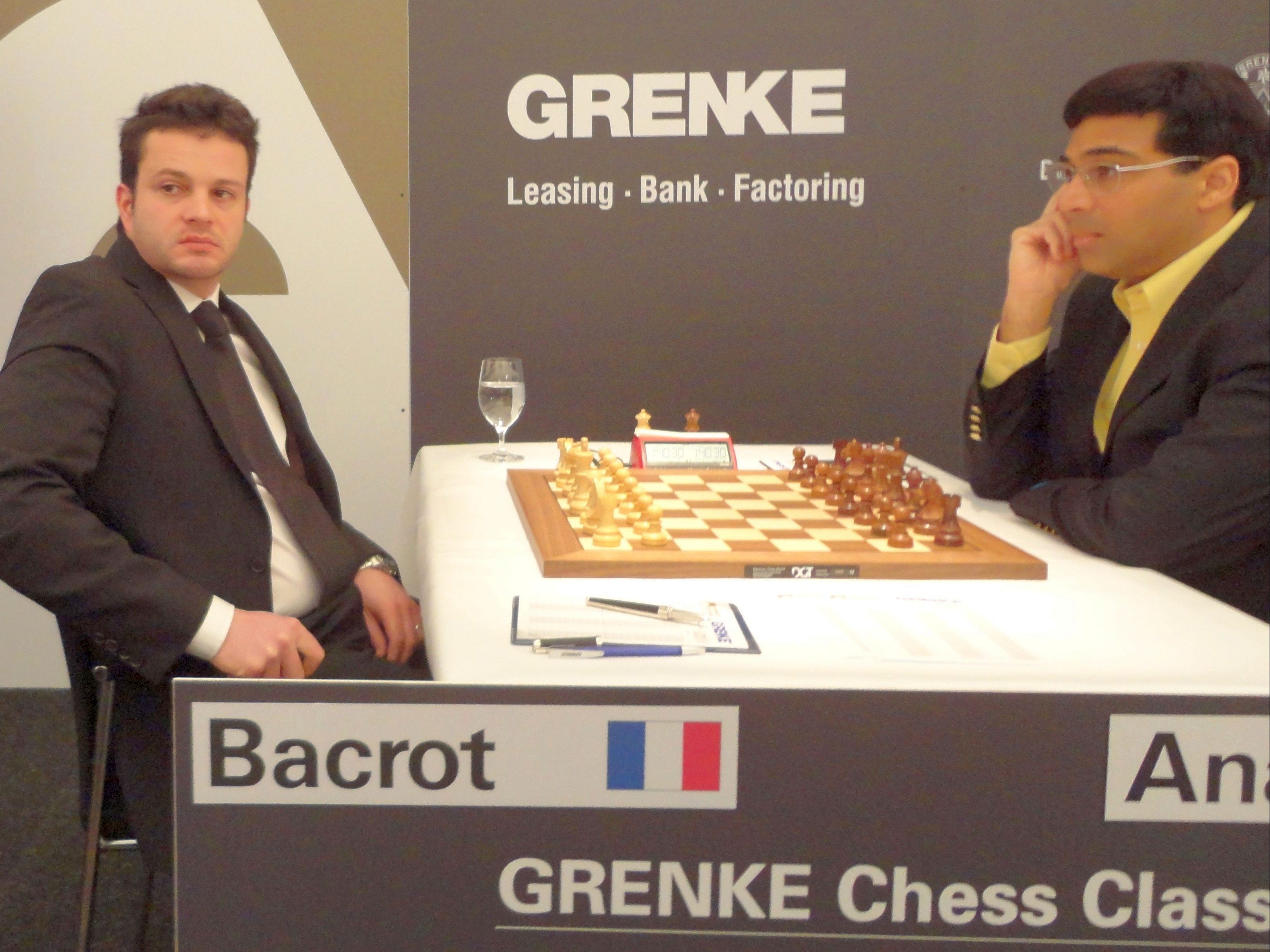 Etienne Bacrot und Viswanathan Anand, Grenke Chess Classic 2015 in Baden-Baden.